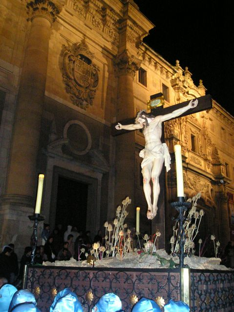 Cristo de los Doctrinos. Cofradía de la Vera Cruz. Salamanca.